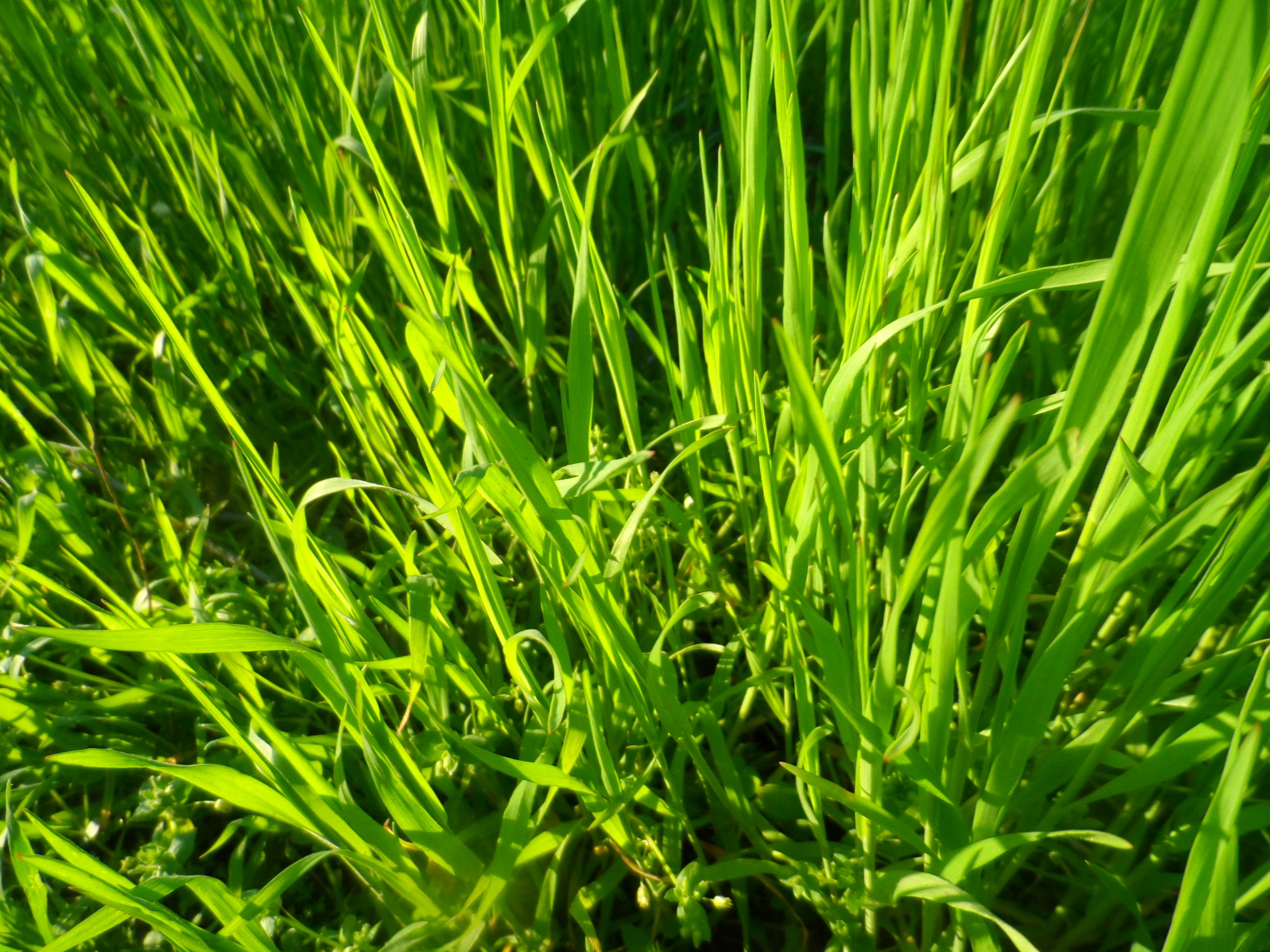 Природа